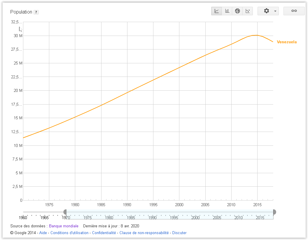 Evolution de la population les 50 ans passés